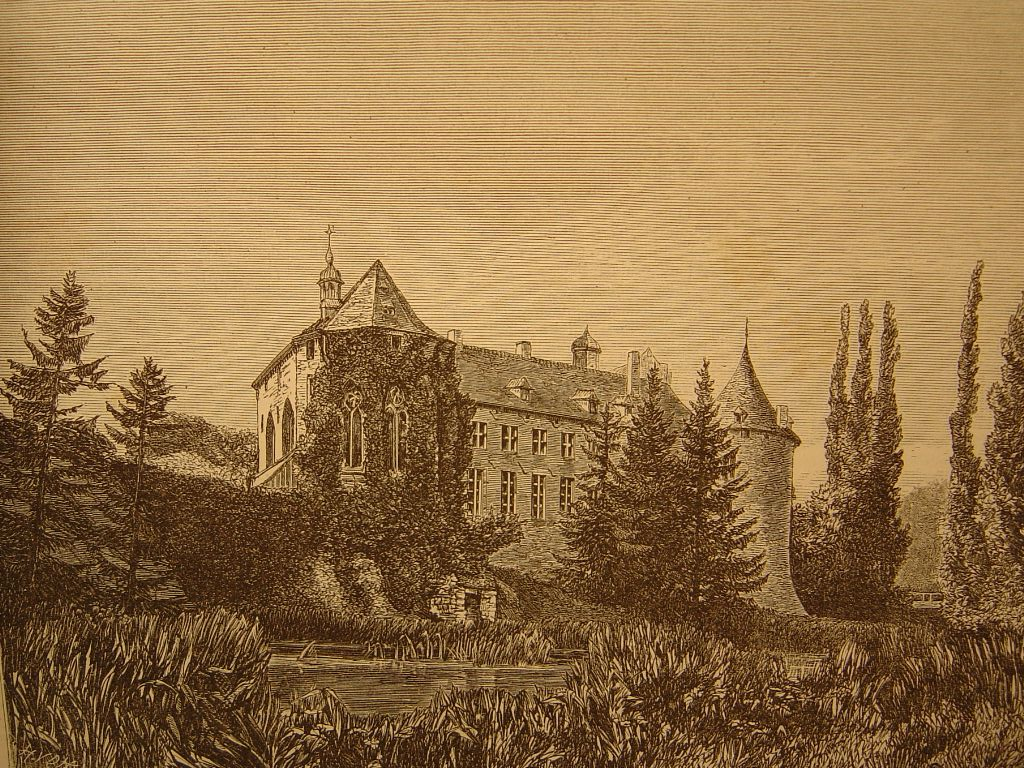 le chateau de Fontaine -l'évêque par H. Van der Hecht